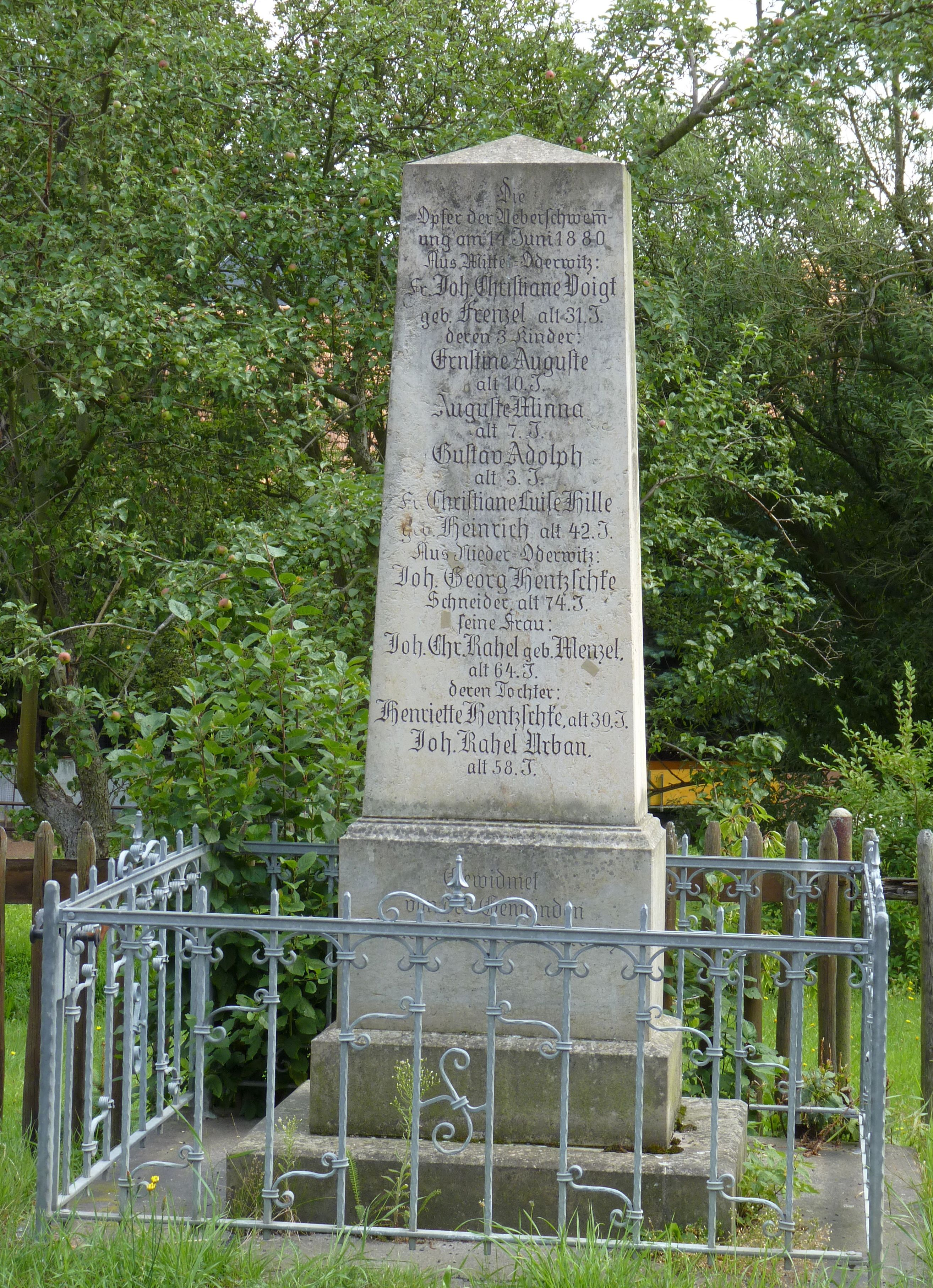 Gedenkstein an die Opfer des Landwasserhochwassers von 1880 in Niederoderwitz.